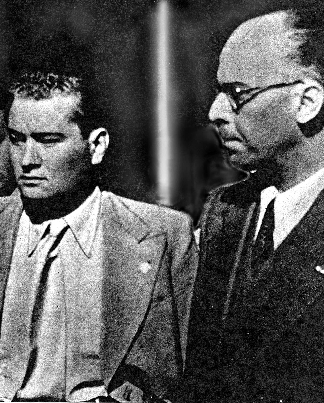 Vittorio Mussolini e Luciano De Feo nel 1938, anno del subentro del primo quale direttore del quindicinale Cinema